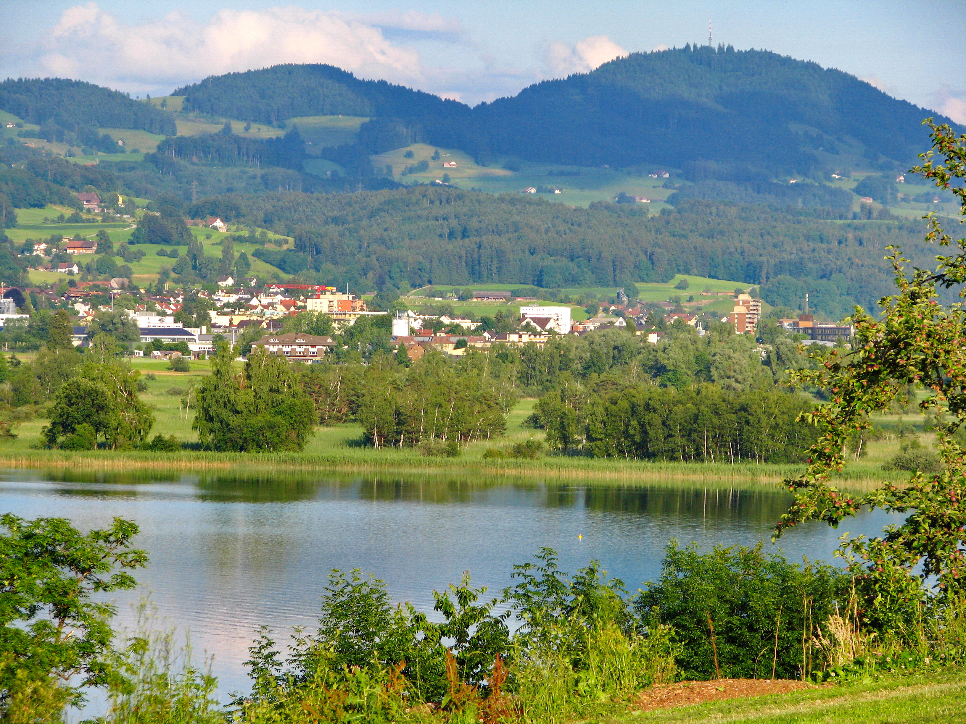 Kempten (Wetzikon) and Pfäffikersee as seen from Seegräben, Bachtel in the background.